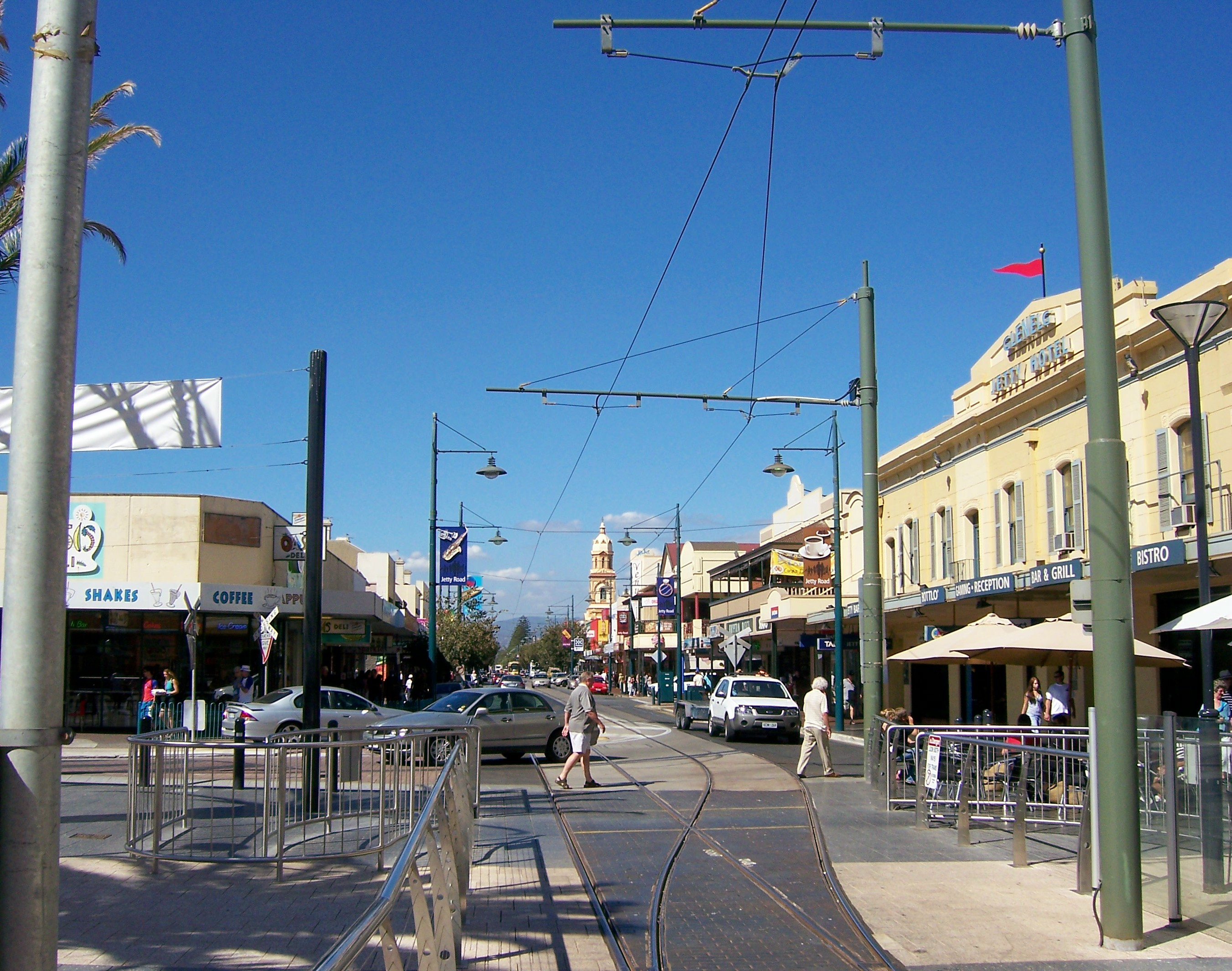 Jetty Road, Glenelg